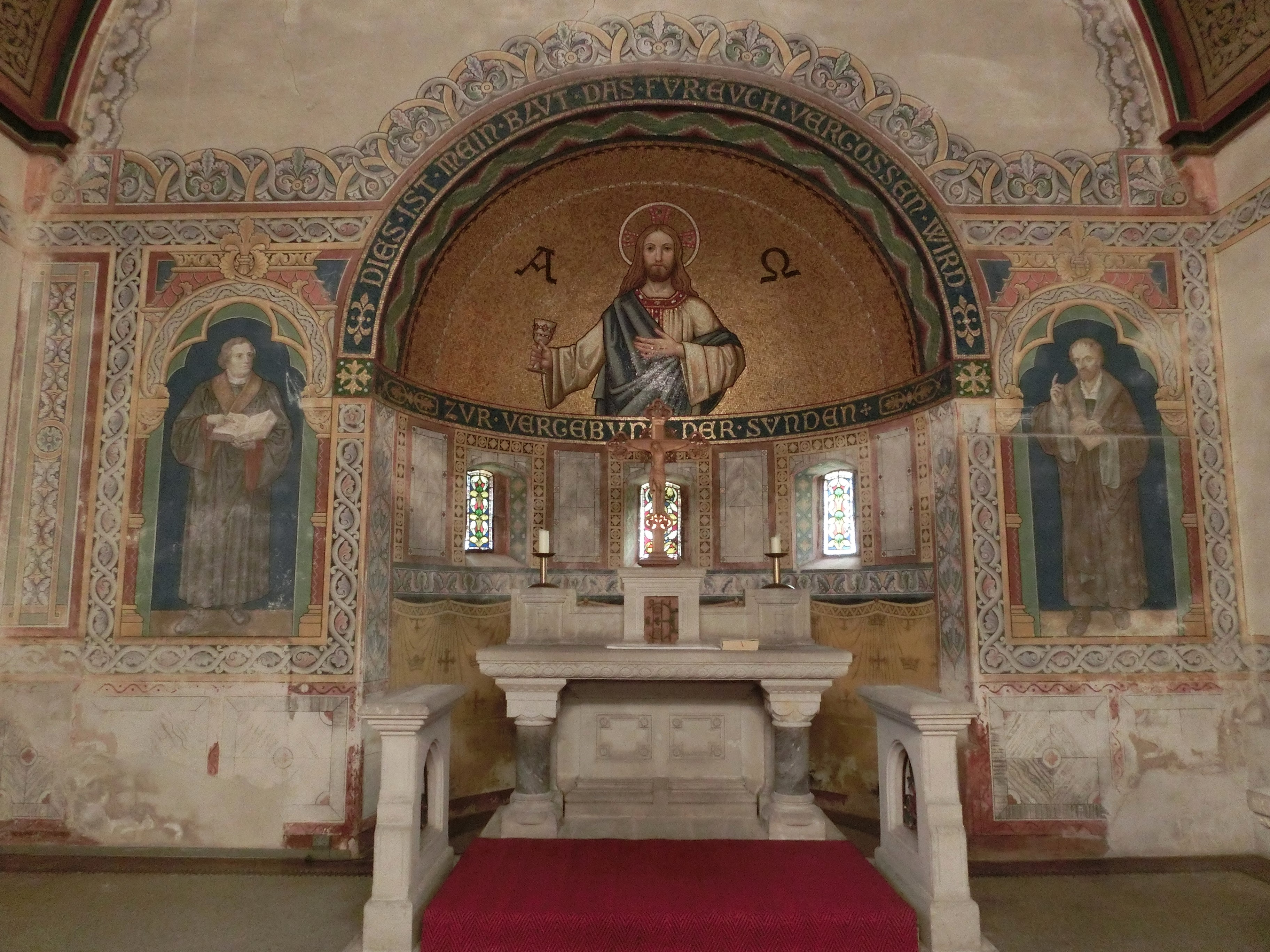 Baudenkmal, Erfassungsnummer 094 50278, Altar, Wandmalereien, Mosaik